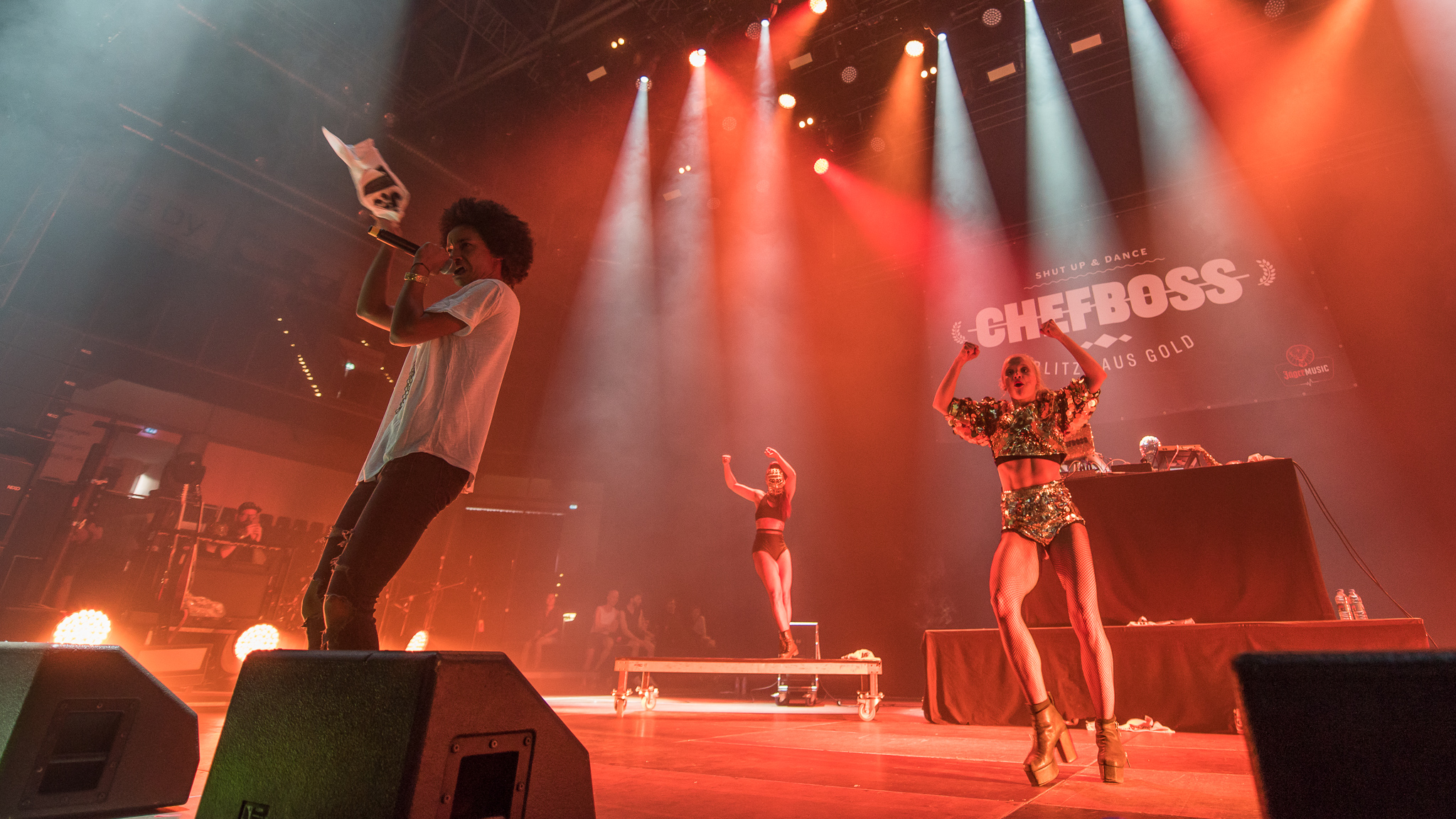 ARGO-Konzerte,Alice Martin,Arena Nürnberger Versicherungen,Chefboss,Engelbert Strauss Alternarena,Konzert,Livekonzert,Livemusik,Maike Mohr,Musik,RiP,Rock im Park 2017